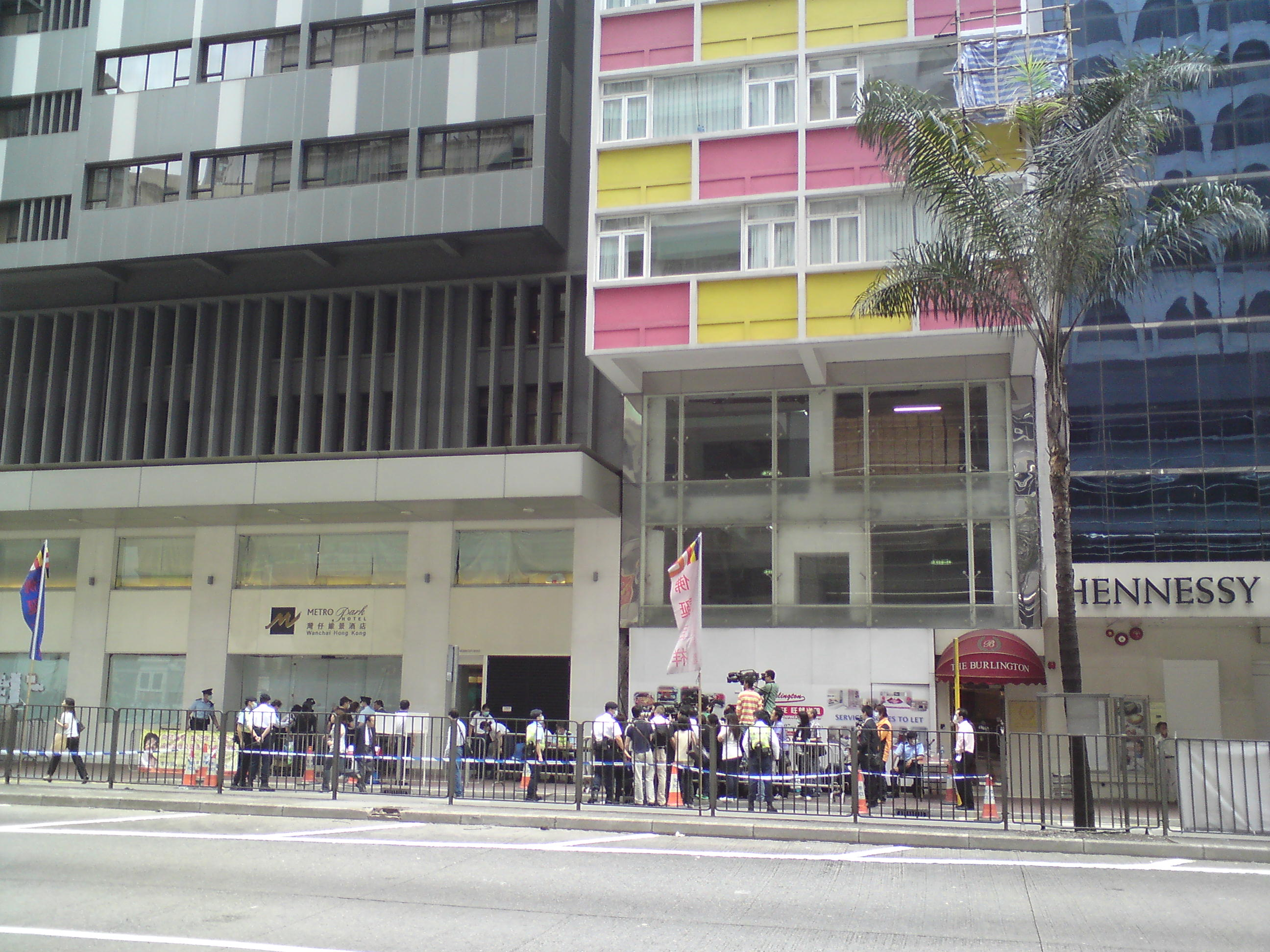 Metropark Hotel Wanchai under swine flu quarantine, Hong Kong